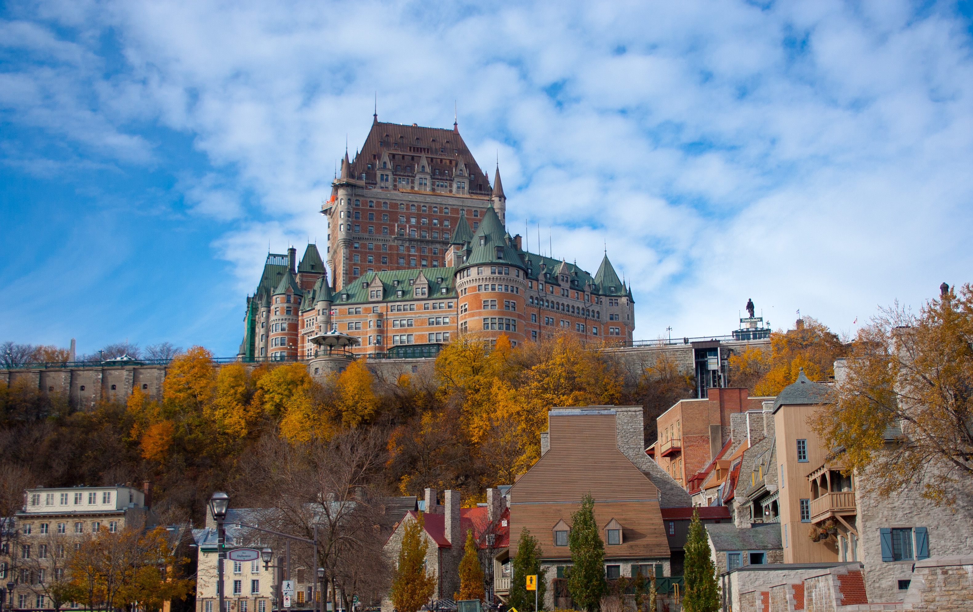 Château Frontenac in fall 2012